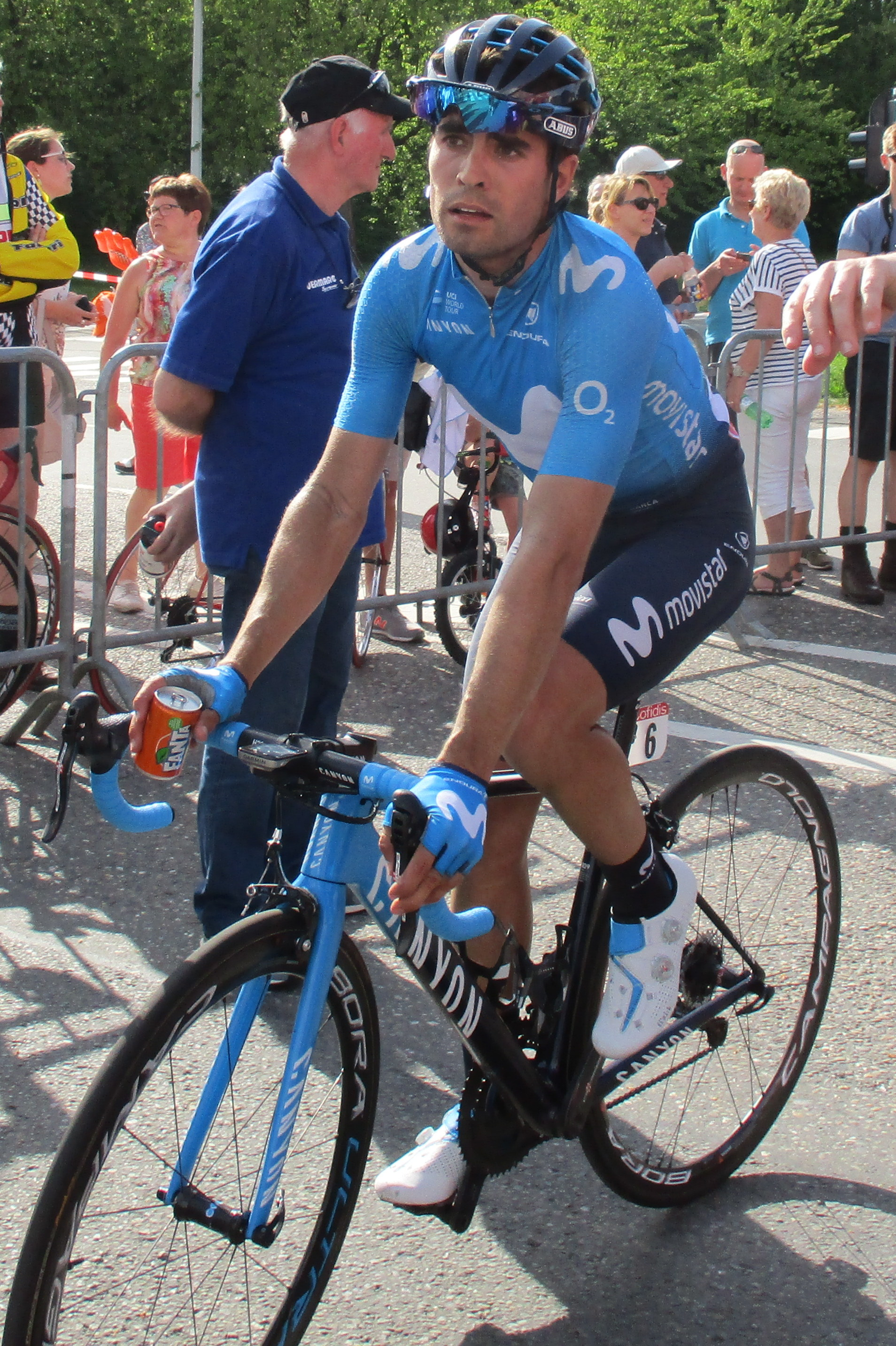 Finish van Luik-Bastenaken-Luik 2018 in Ans.